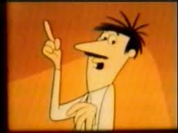 Zappalà Cartoon